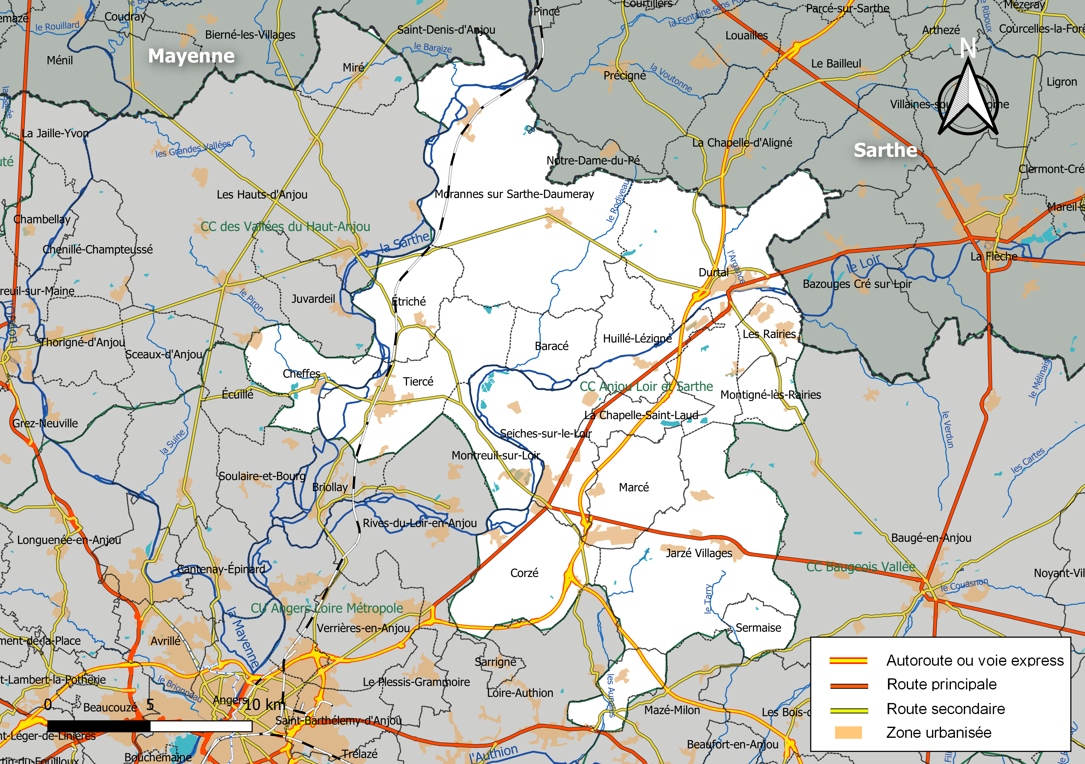 Carte géographique de la Communauté de communes Anjou Loir et Sarthe, département de Maine-et-Loire, France. Composition au 1er janvier 2019.